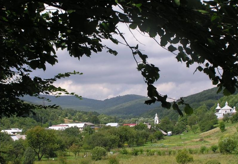 Celkový pohľad